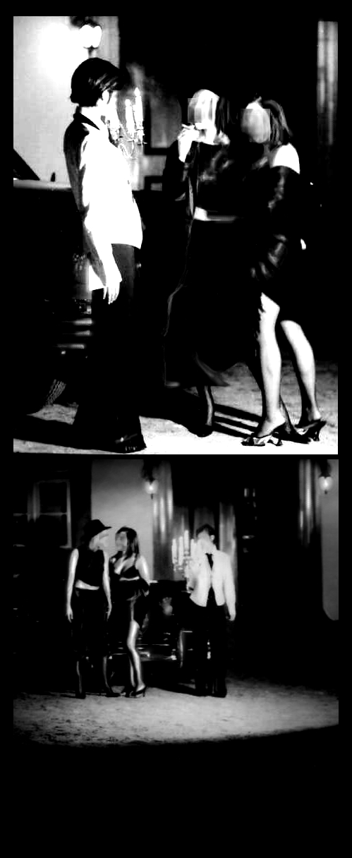 Festa do solar de Beirós